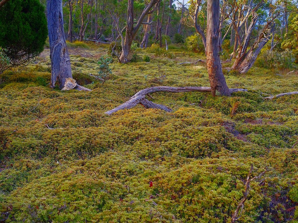 クレイドル山国立公園 エンチャンテッド･ウォーク 130202_7229